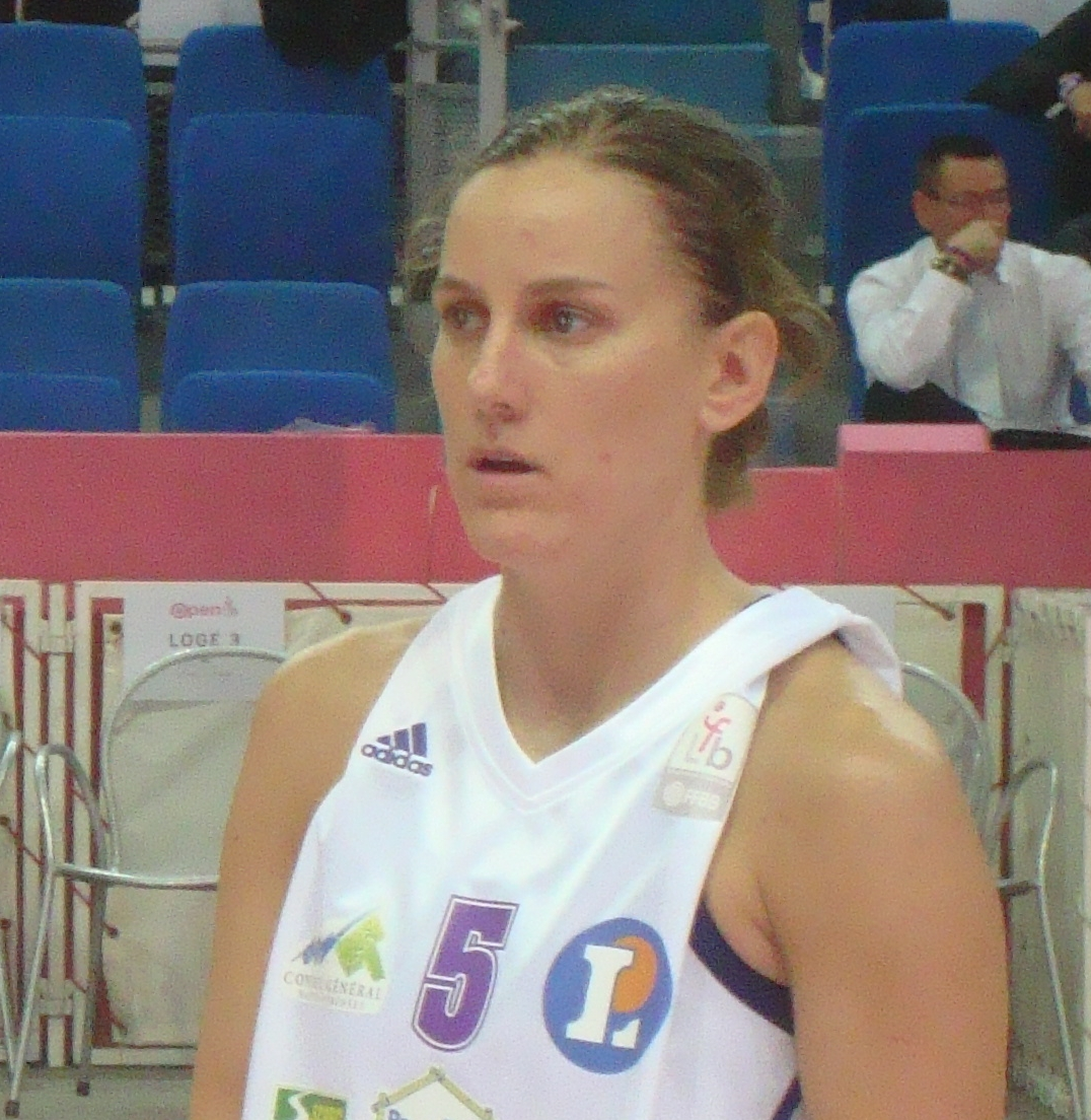 La basketteuse américaine Erin Thorn sous le maillot de Tarbes